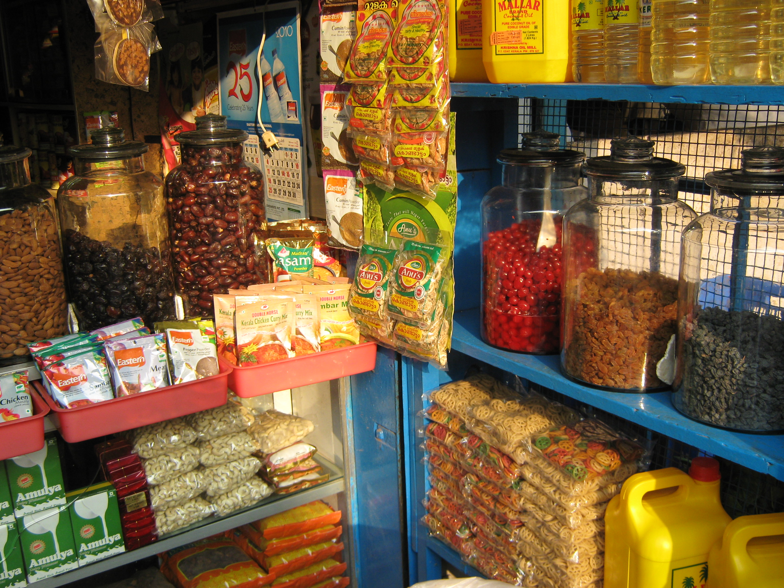 Kannur, Kerala, India.